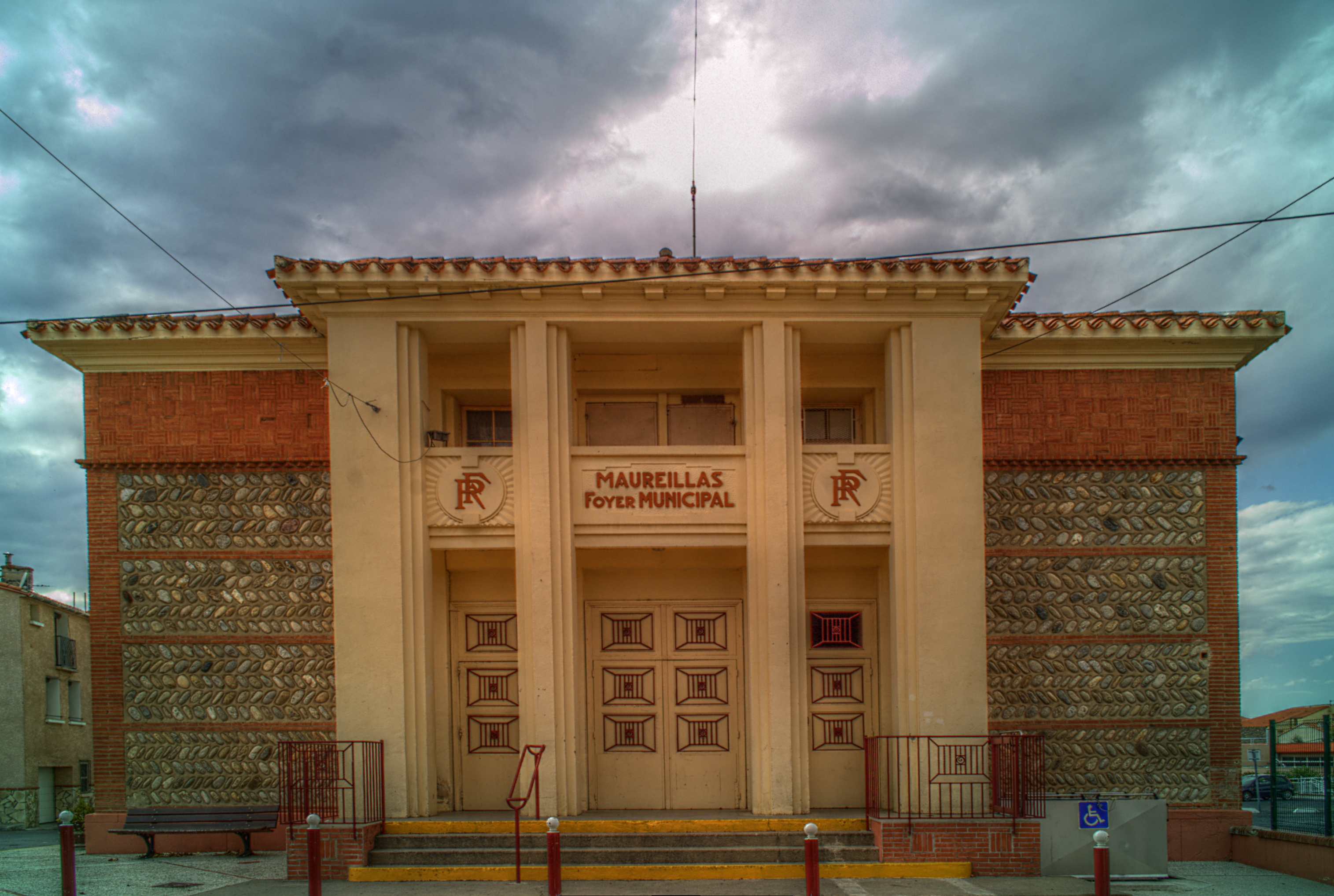 Foyer Municipal, Maureillas-las-Illas (Pyrénées-Orientales, Languedoc-Roussillon, France), La Jonquera (Haut-Ampurdan, Catalogne, Espagne)